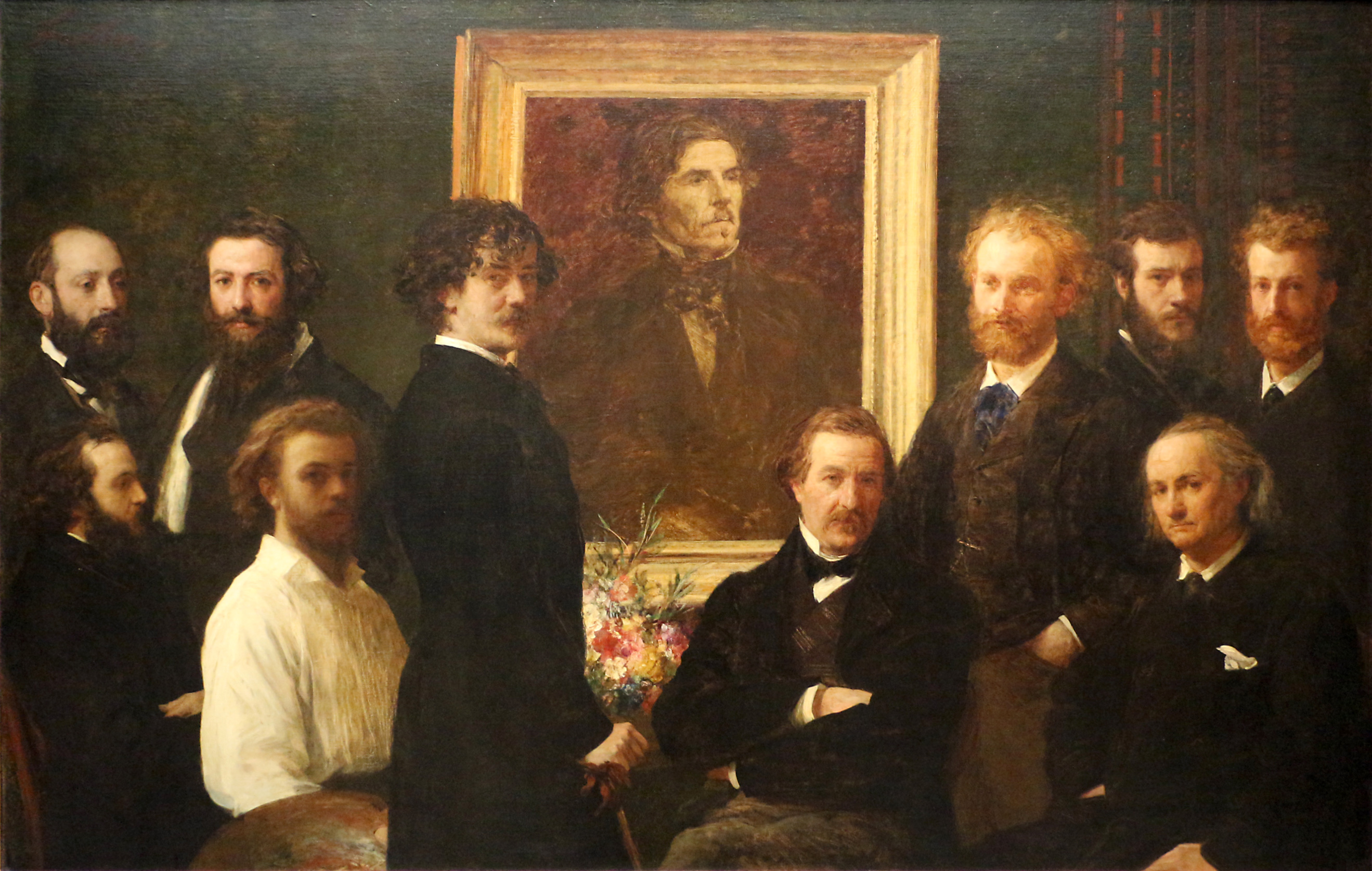 Hommage à Delacroix - Henri Fantin-Latour, Musée d'Orsay